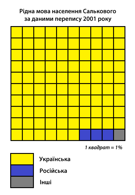 Інфографіка розподілу населення смт Салькове Гайворонського району за рідною мовою згідно з даними перепису 2001 року. Джерело: Розподіл населення Кіровоградської області за рідною мовою (у % до загальної чисельності населення) за переписом 2001 року